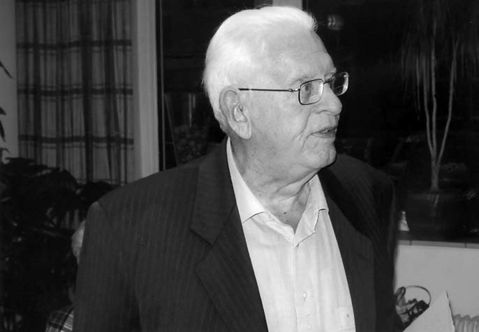 Portretfoto van Pieter Gerbenzon (1920-2009). Foto afkomstig uit Levensberichten en herdenkingen 2010 van de Koninklijke Nederlandse Akademie van Wetenschappen (Amsterdam, 2010).